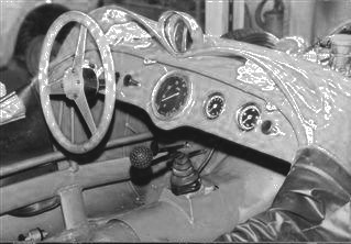 foto personale 1988 forlì italia bandini 1100 siluro